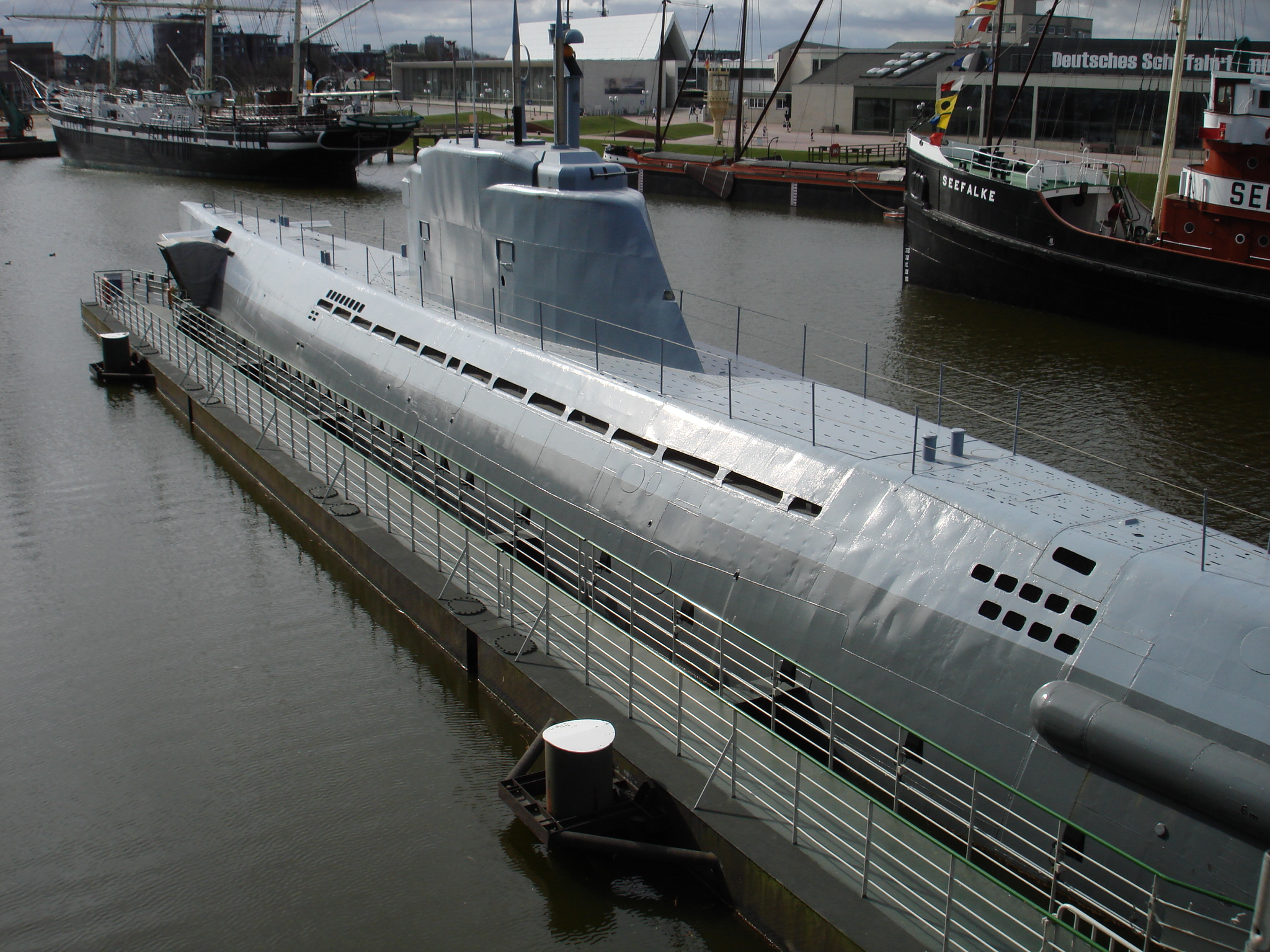 Wilhelm Bauer (U 2540)